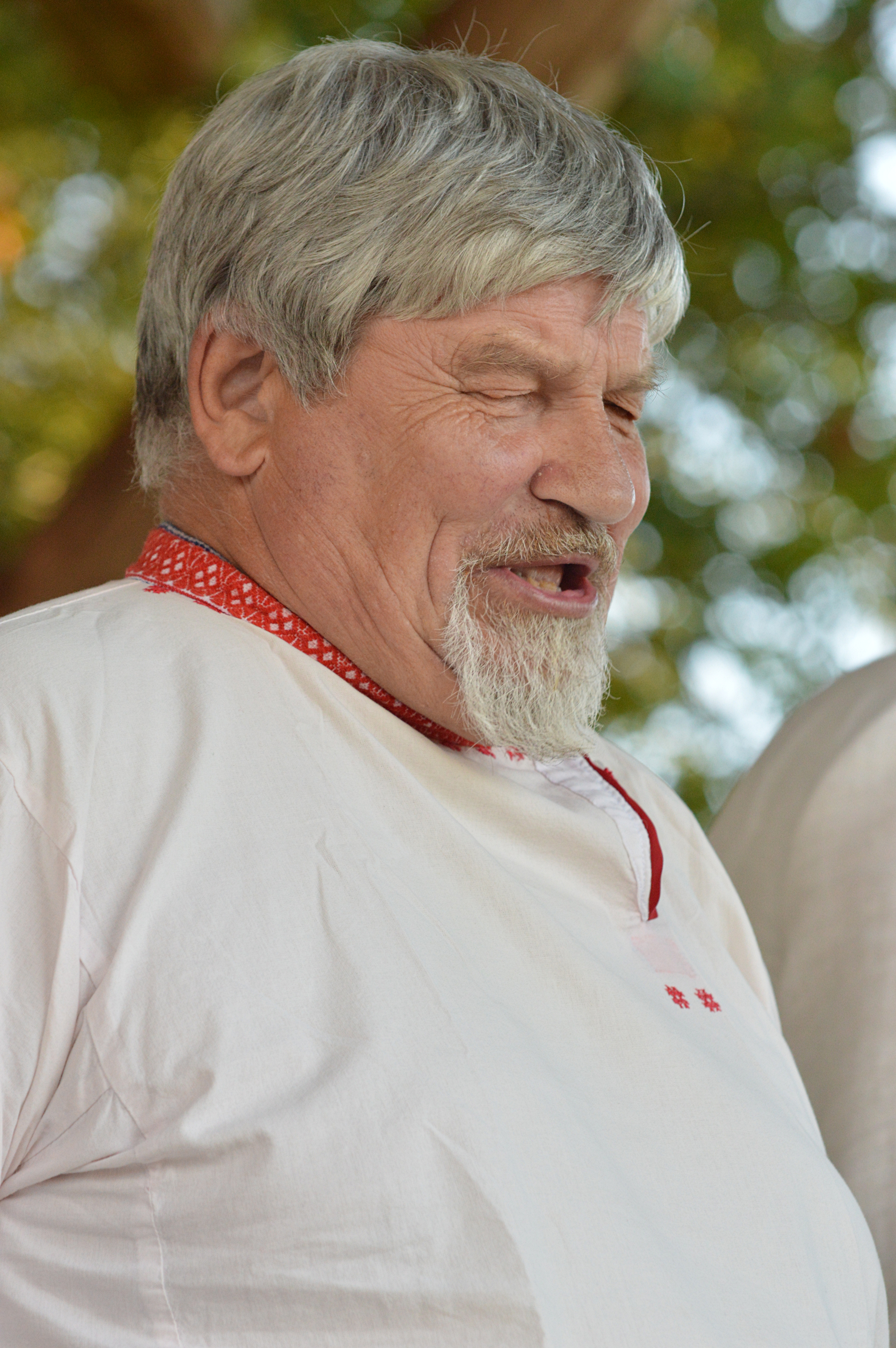 Liinatsura Paul Hagu. Seto kultuuri festival Radajal.